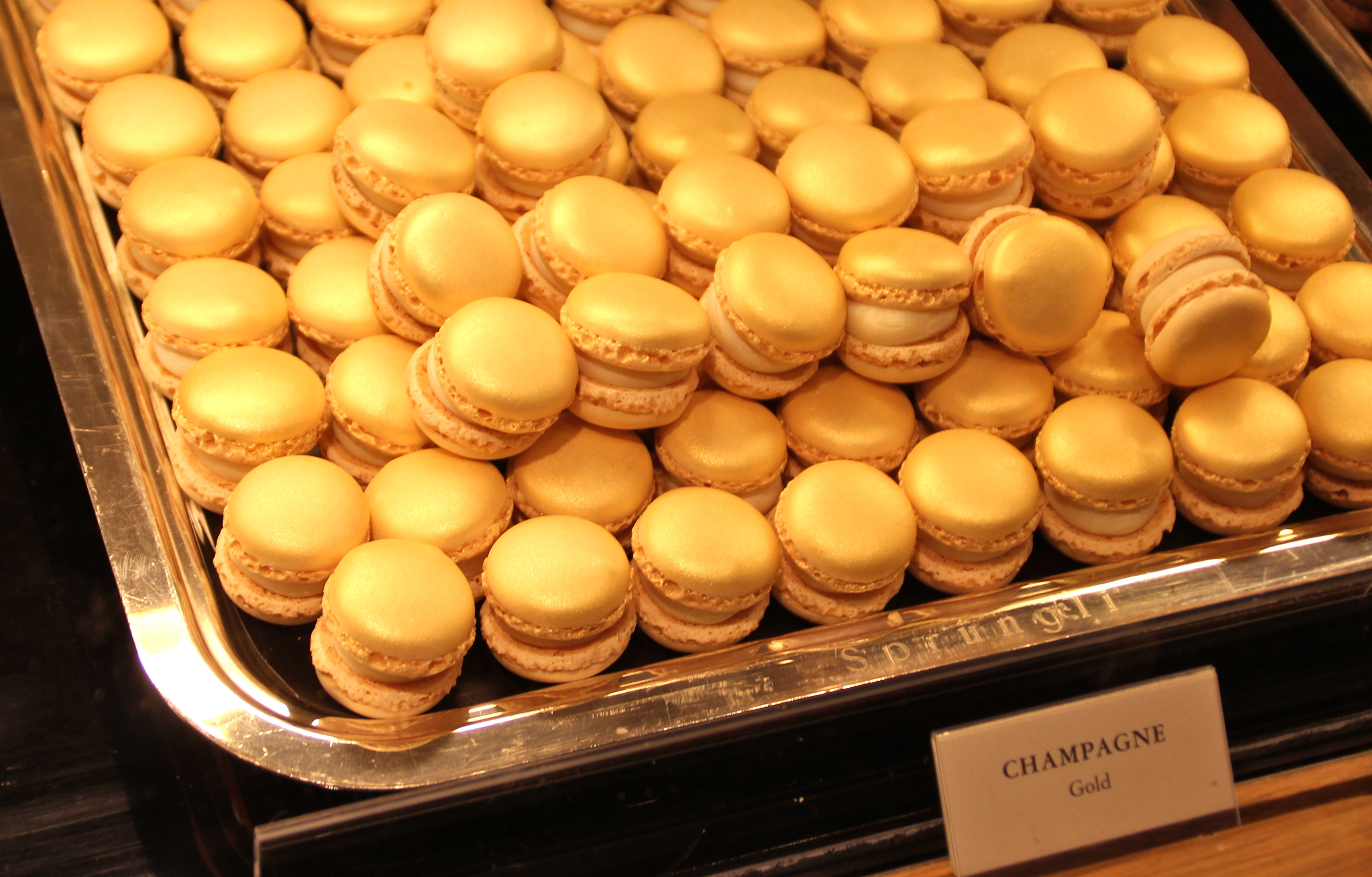 Gold-Champagner-Luxemburgerli.